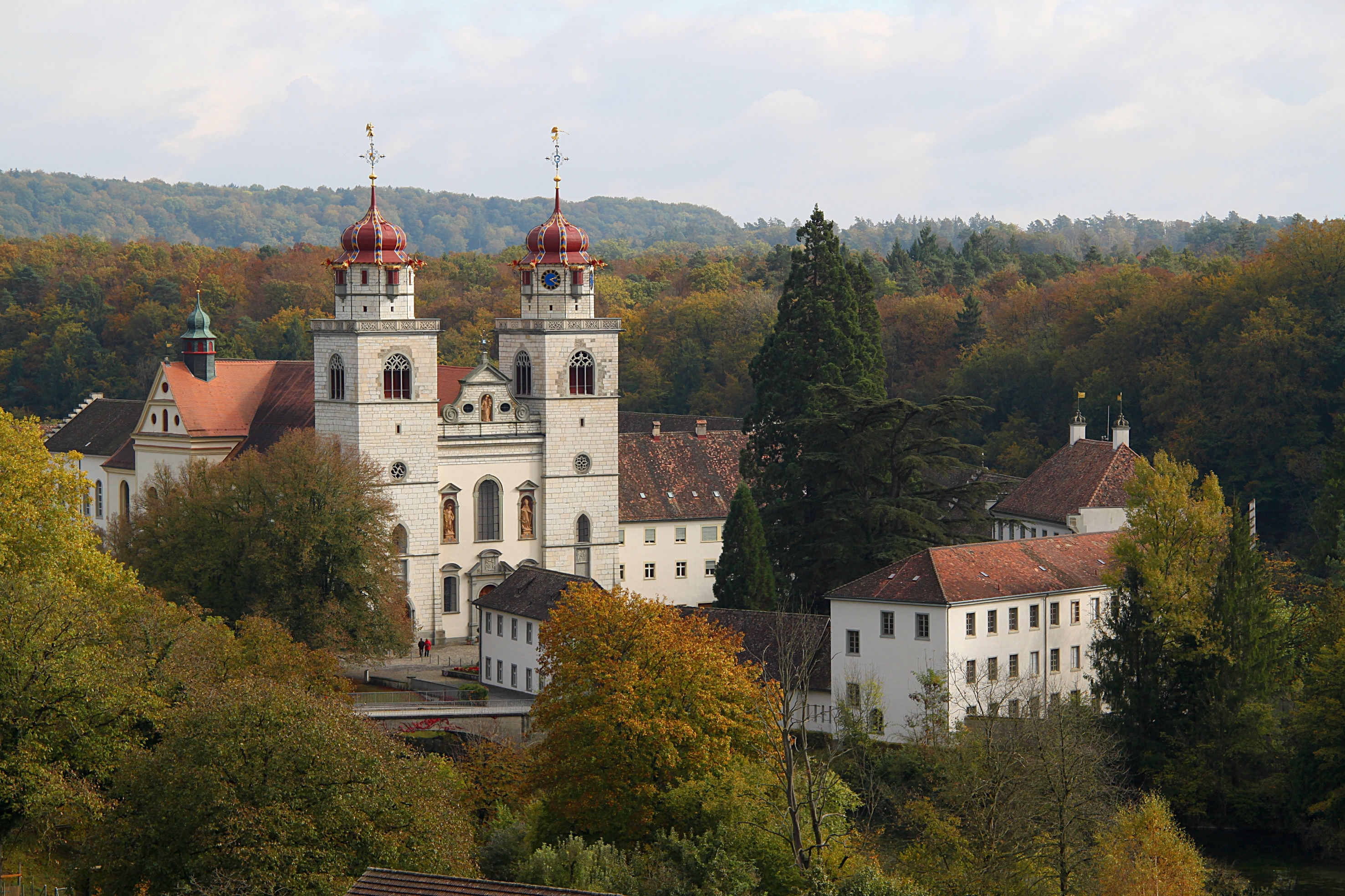 Kloster Rheinau